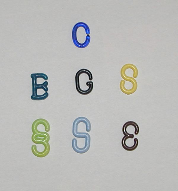 různé tvary céček Autor:Li-sung